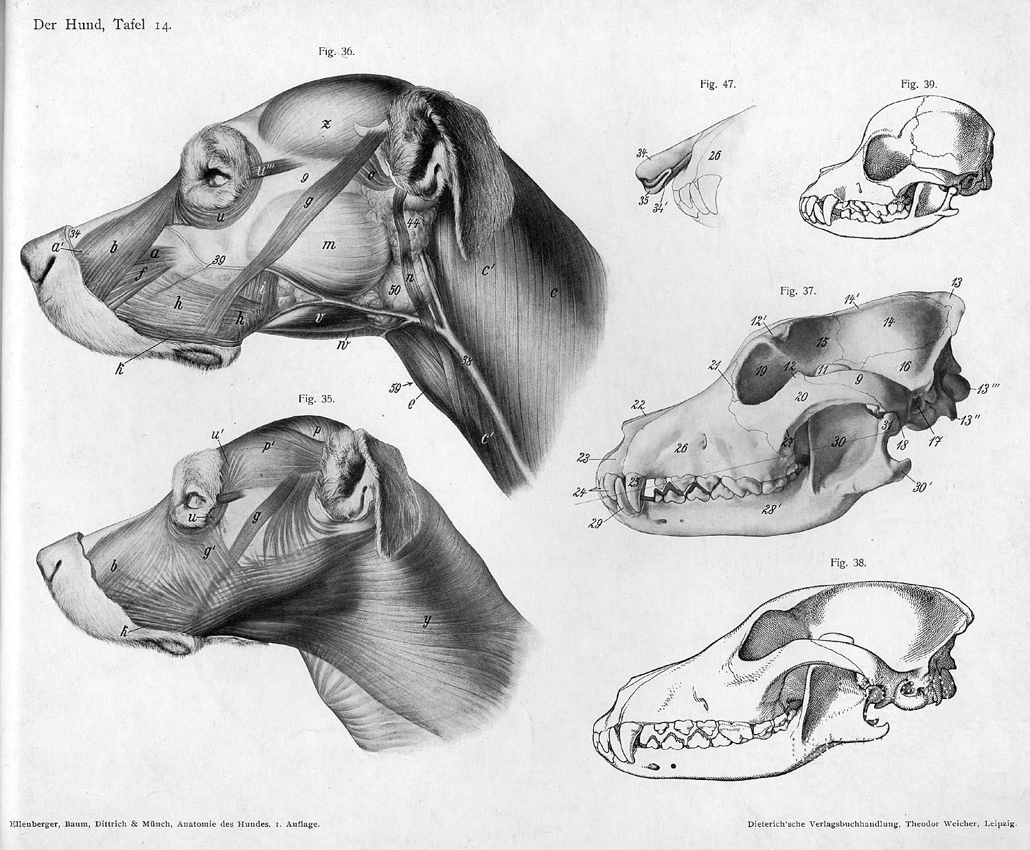 Animal anatomical engraving from